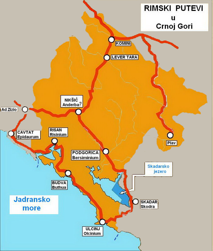 Rimski putevi u Crnoj Gori.